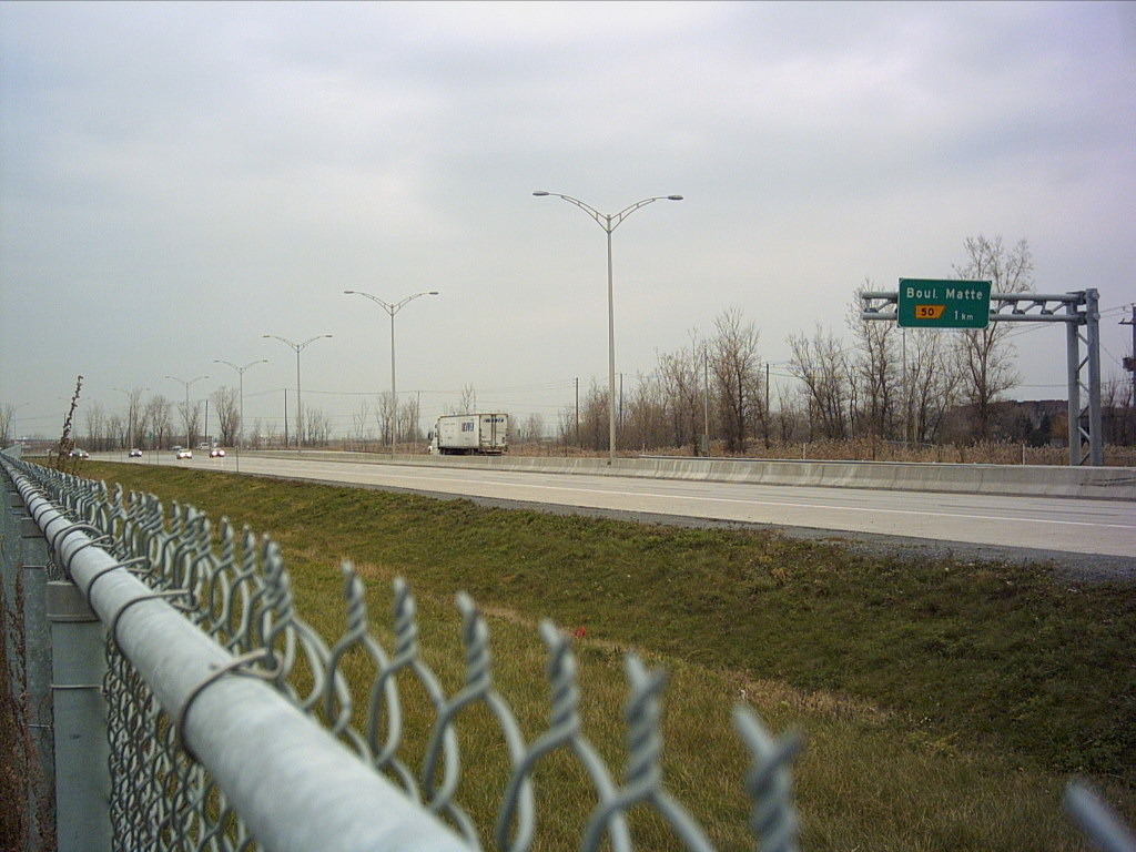 C'est à cet endroit que se situerait la bretelle donnant à l'autoroute 6. (Photo: Numero 3)